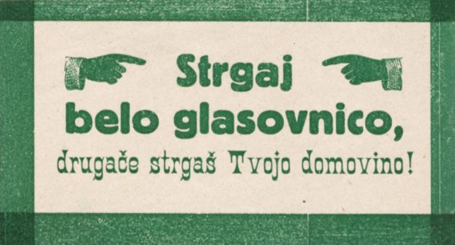 Nalepka ob plebiscitu Strgaj belo glasovnico, drugače strgaš tvojo domovino!